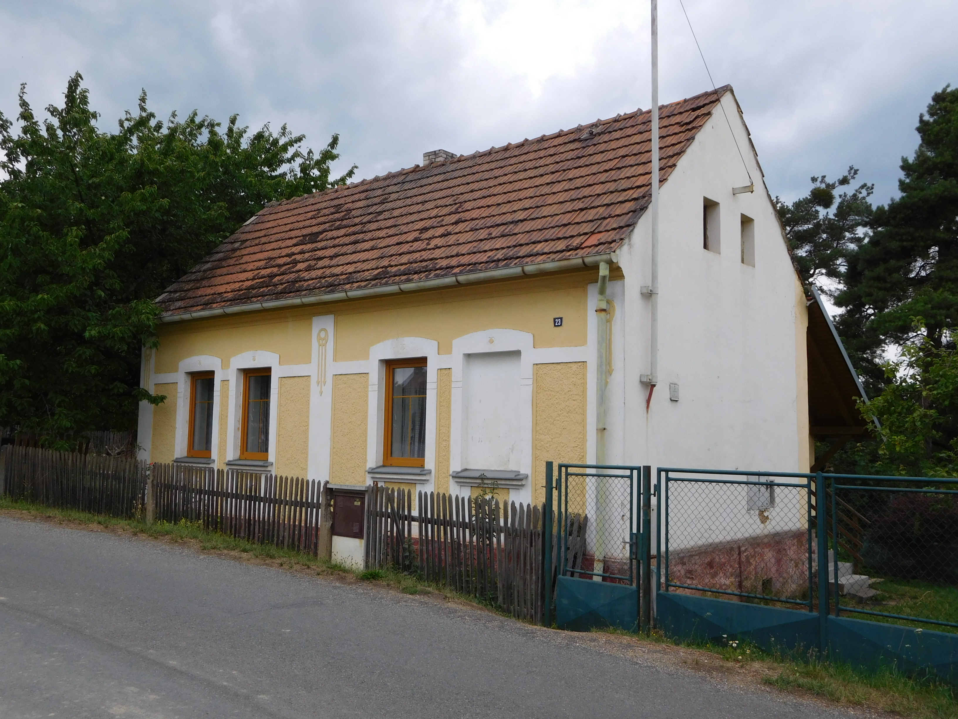 Nová Jezná - dům č.p. 23